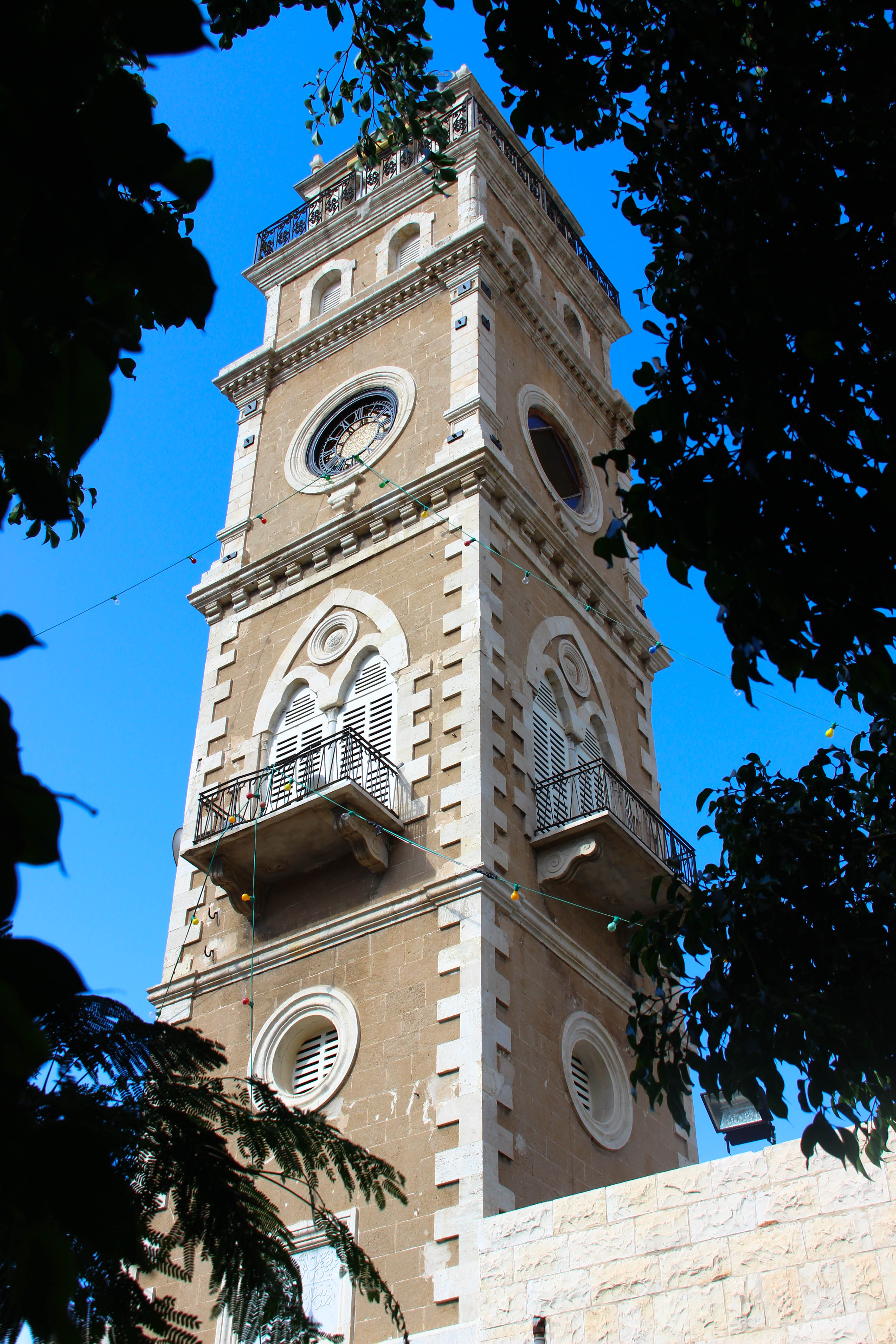 مسجد الجرينة، حيفا. تصوير: معتز توفيق اغبارية.